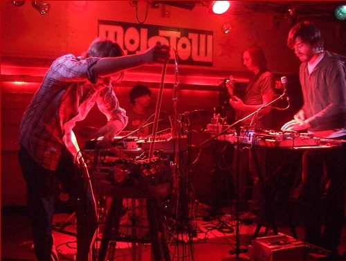 Holy Fuck in Molotow op 14 April 2008